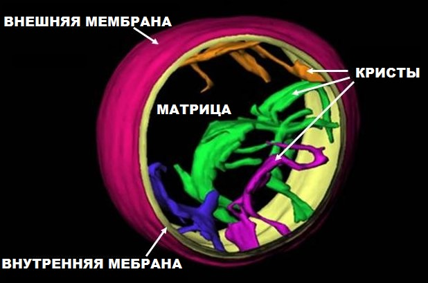 Это изображение митохондрии замороженной гидратированной крысой печени основано на работе, выполненной ресурсом Wadsworth Center для визуализации биологической сложности ( Ранее не публиковалось, публикуется в общественное достояние.